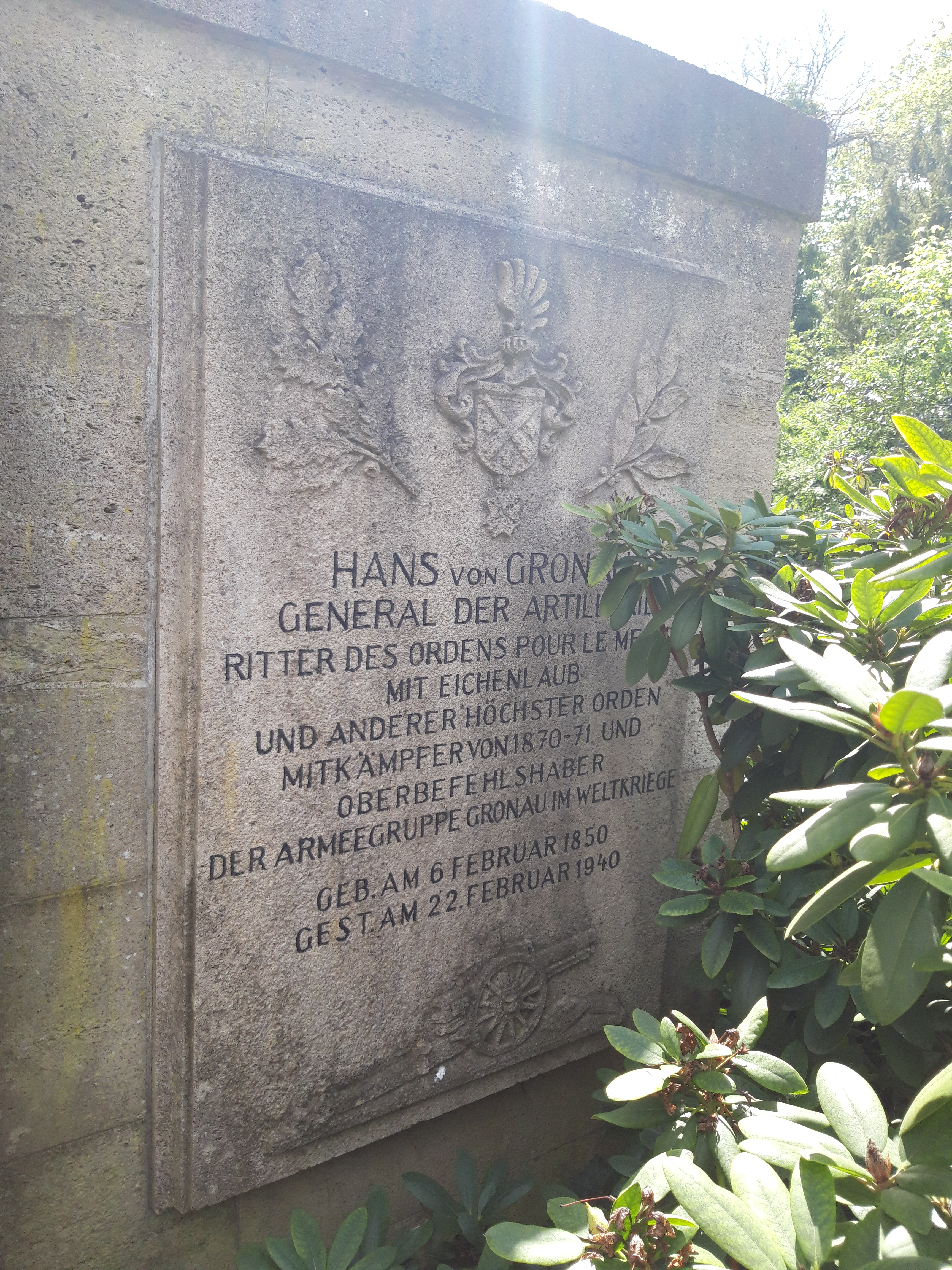 Grabplakette für General der Artillerie Hans von Gronau.